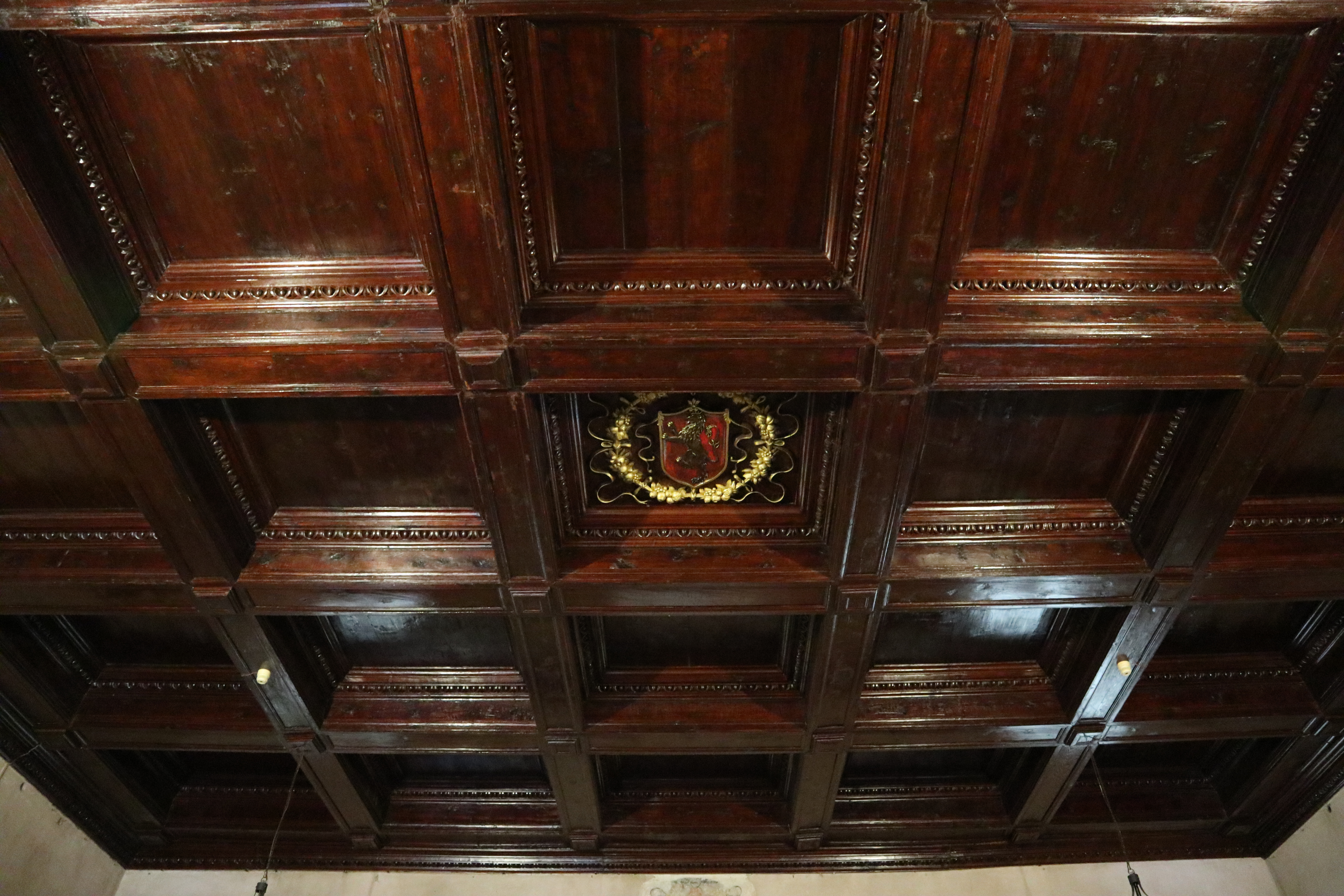 Sala del Maggior Consiglio, Soffitto di Pieramore di Bartolomeo Pierleoni dal 1522-25